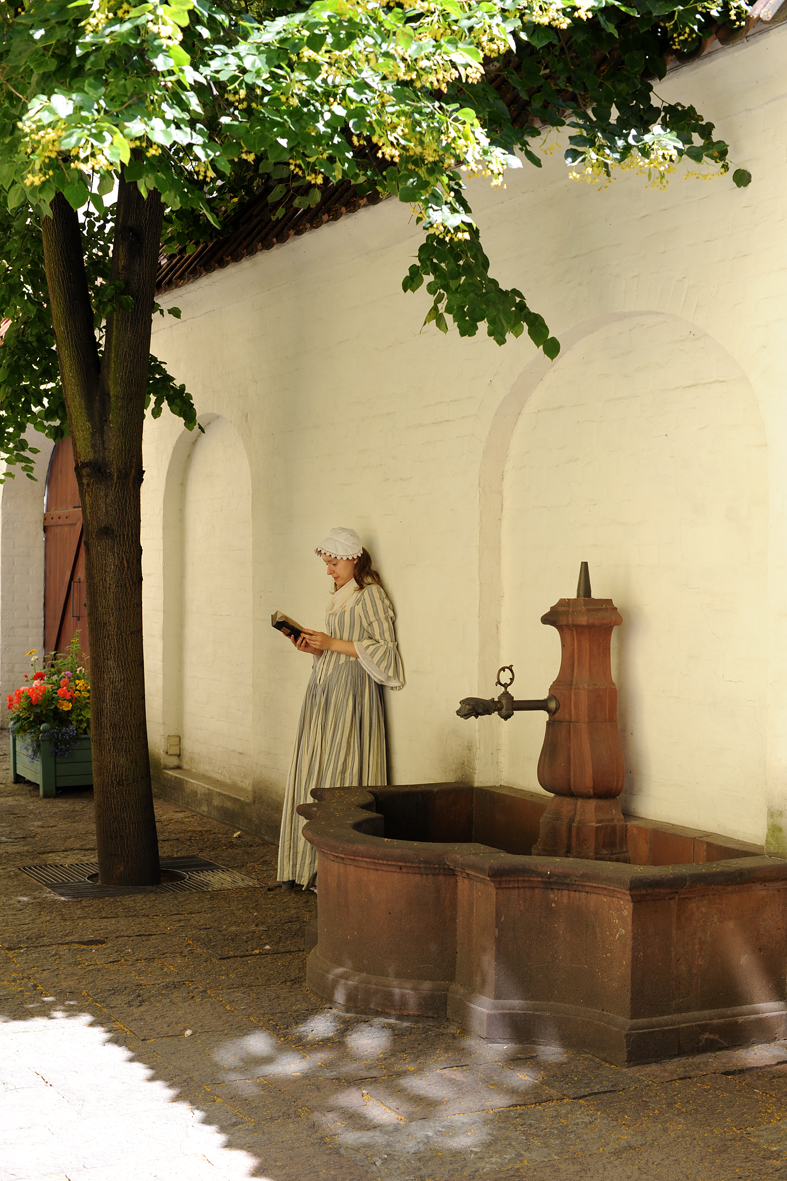 Studzienka na podwórzu. Fot. Ewa Grela, zbiory Muzeum Gdańska